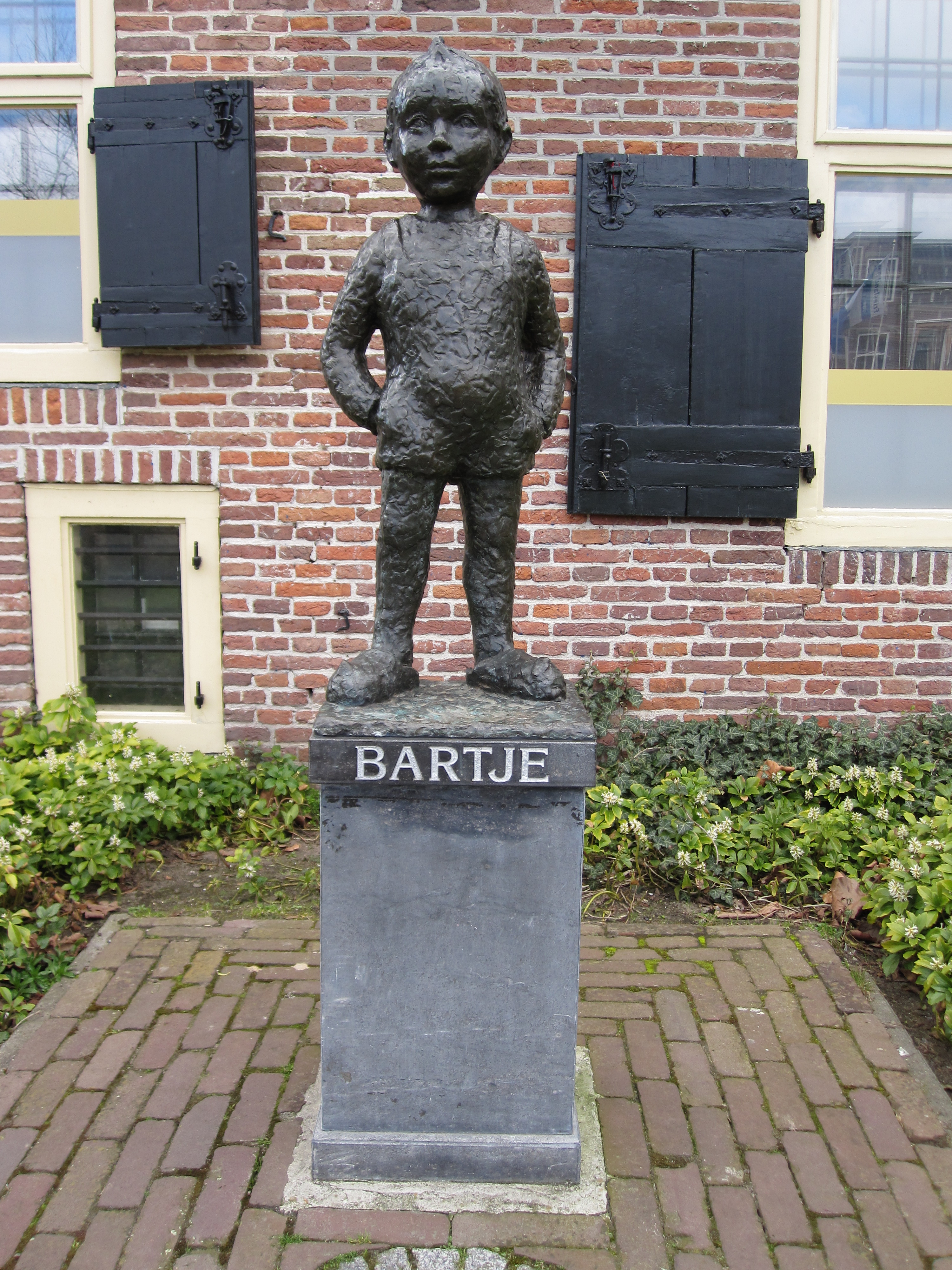 Statue in Assen von Bartje Bartels, der Hauptfigur einiger Romane von Anne de Vries